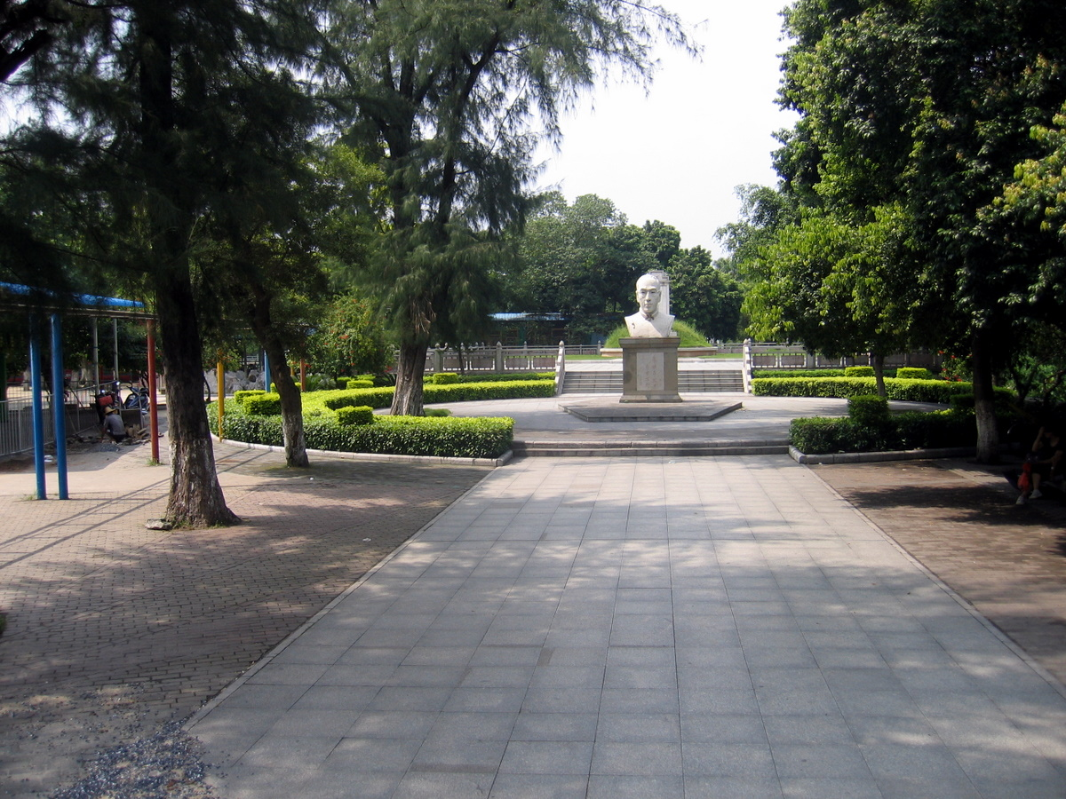 玉林人民公园